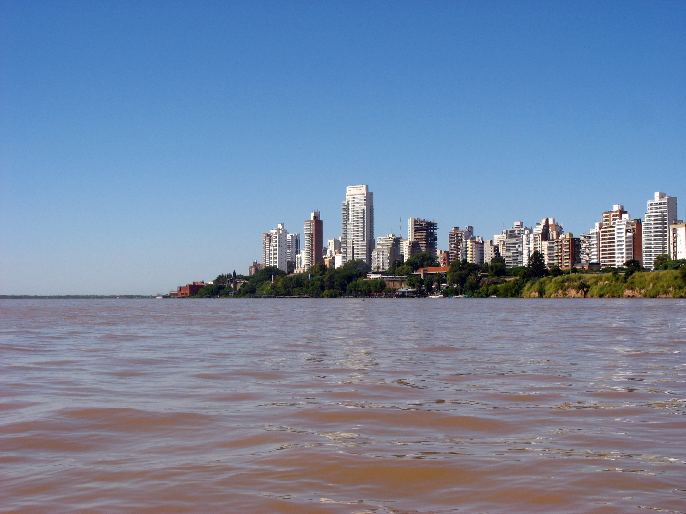 Rosario desde el Río Paraná